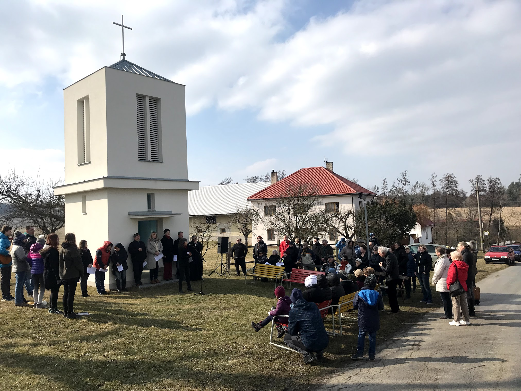 Velikonoční setkání u kapličky v Deblově